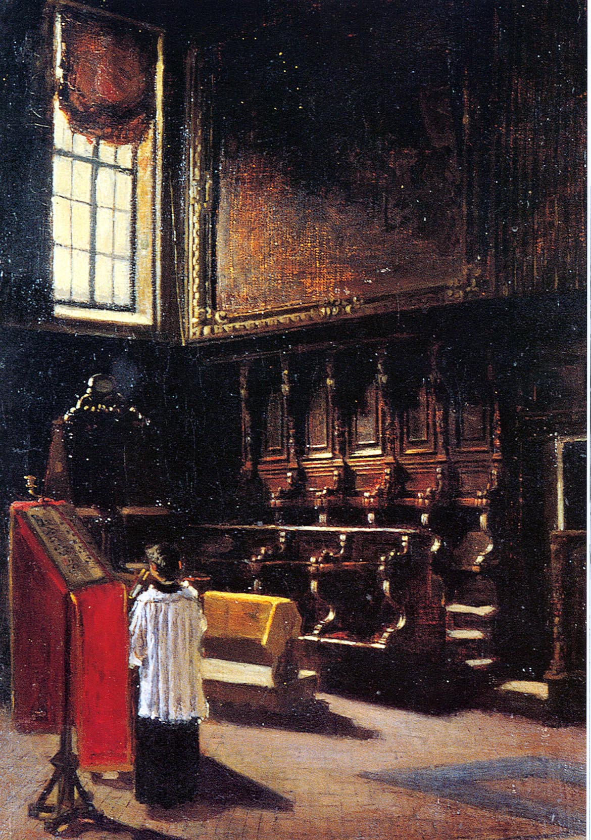 Coro_di_St.Antonio, 1879, 119x85 cm, Öl auf Leinwand, Privatsammlung